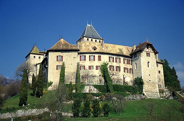 Schloss Blonay